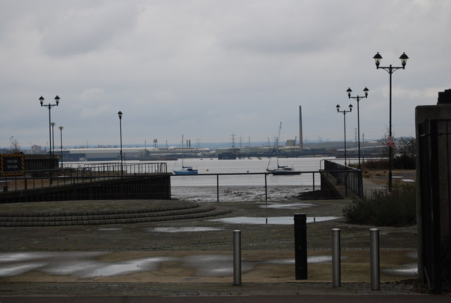 Grays, England